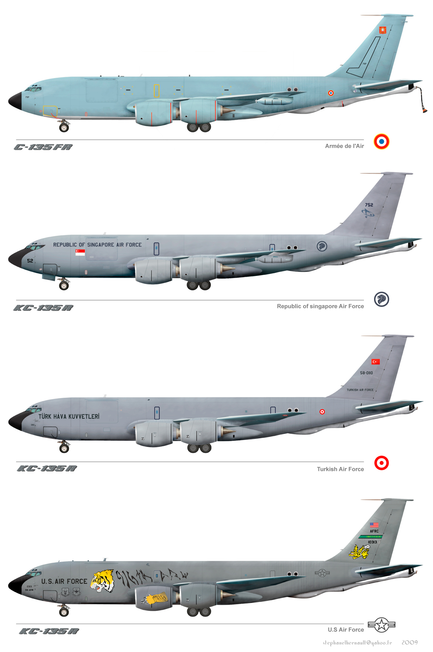 KC 135 en service France/Singapur/Turkish/USA